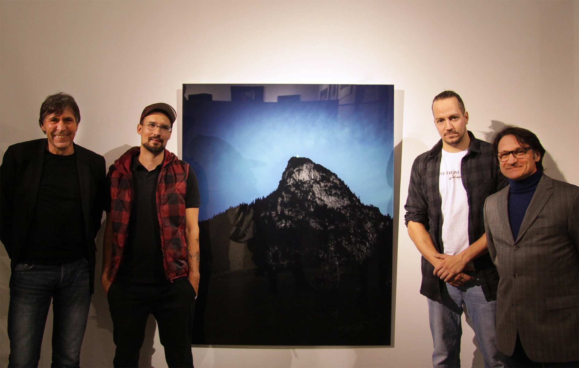 (v.l.) Erster Bürgermeister Oberammergau Arno Nunn, Sebastian Hertrich, Sebastian Wanke, Wolfgang van Elst